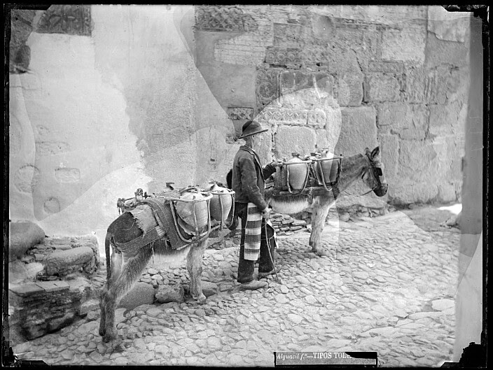 'Azacán (aguador) de Toledo' (hacia 1900) fotografiado por Casiano Alguacil.